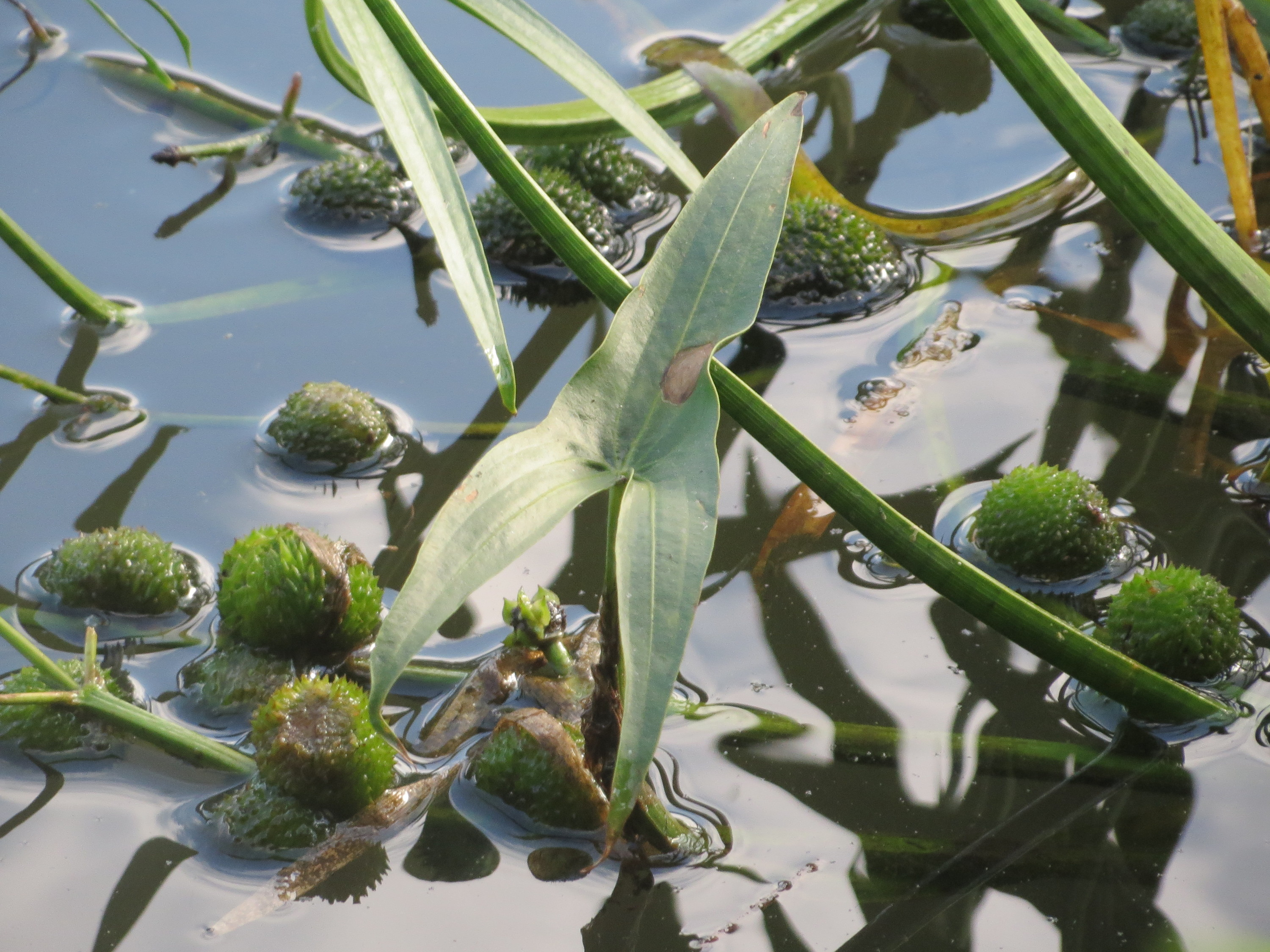 Gewöhnliches Pfeilkraut (Sagittaria sagittifolia) an der Saar in Saarbrücken